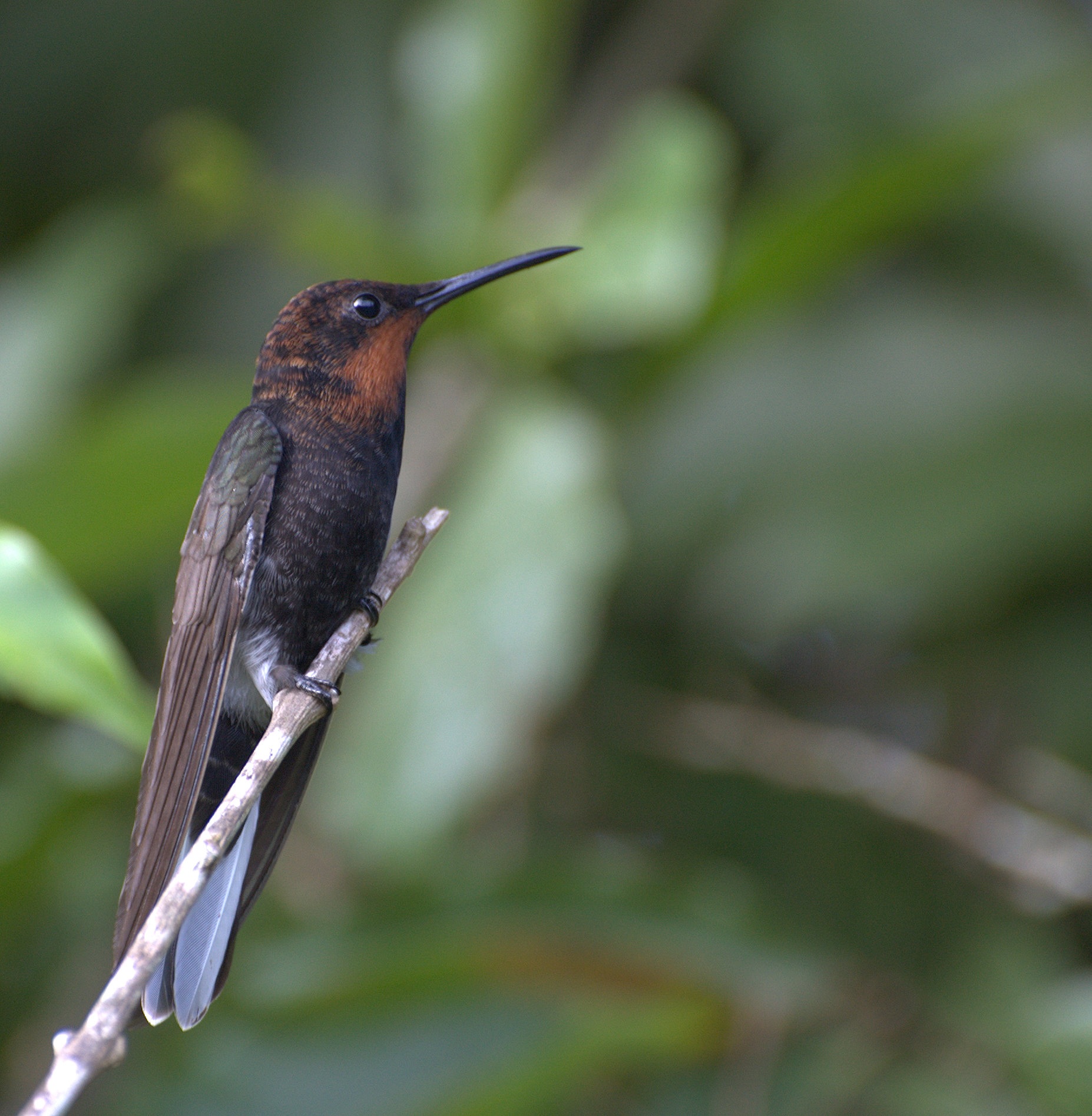 immature Florisuga fusca, from Chácara Antonio Wuo, Mogi das Cruzes-SP (Brazil)